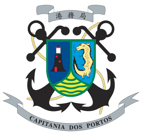 中文（香港）: 港務局